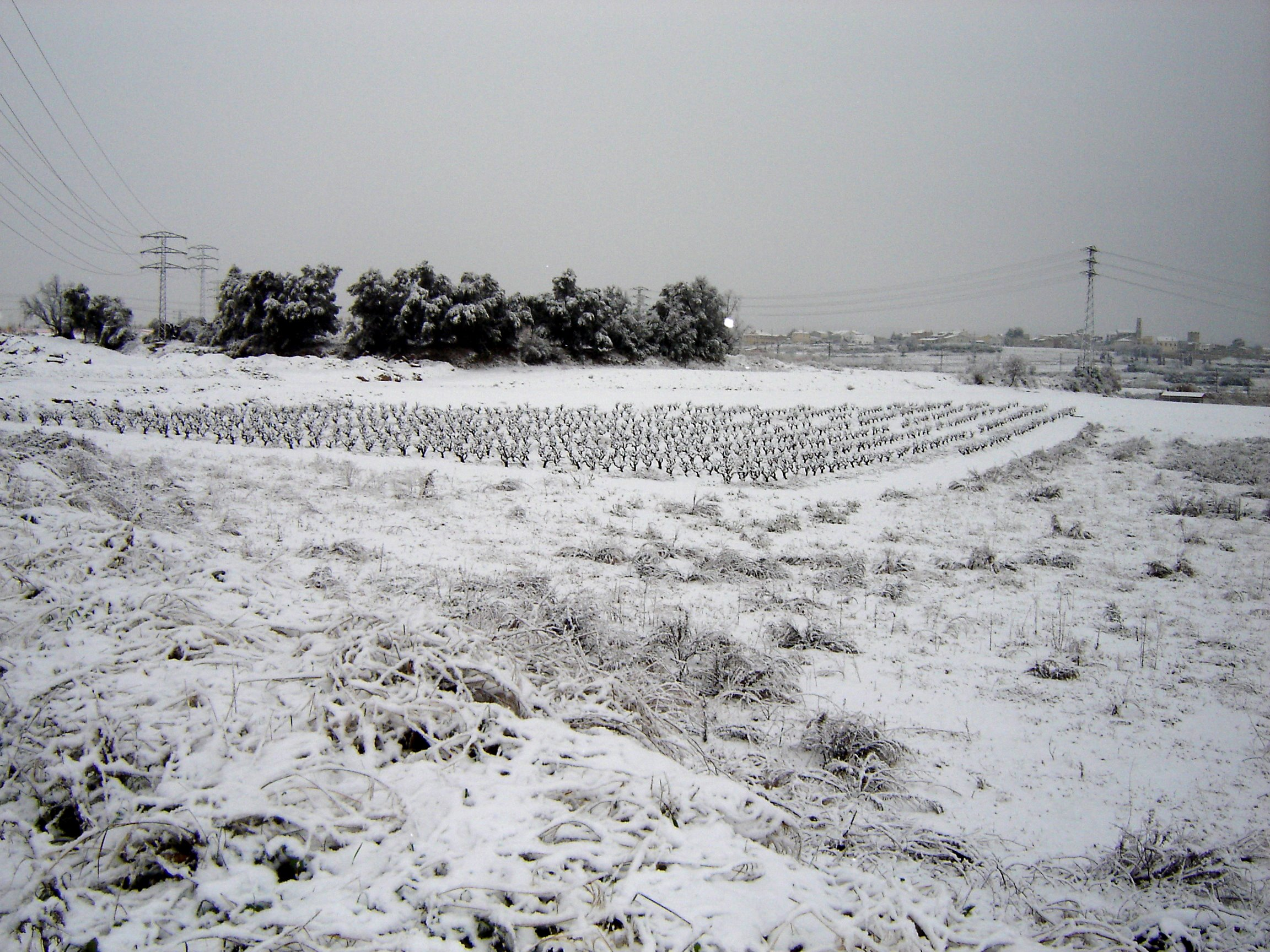 Afores de Vilafranca durant la nevada del febrer de 2005